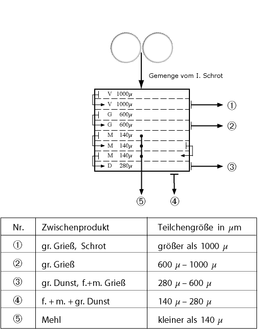 Plansichter: Teilchengröße der Zwischenprodukte